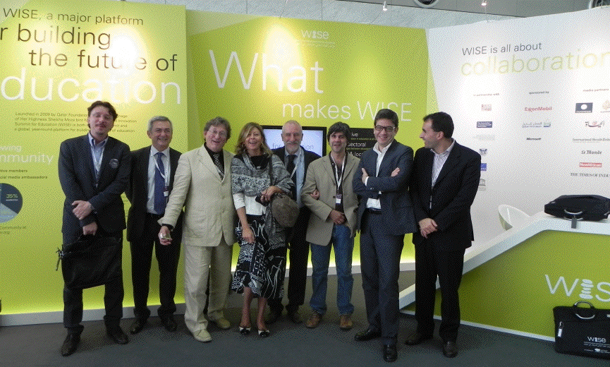 Delegazione italiana a WISE 2011. Da sinistra: Fabio Nasimbeni, Claudio Dondi, Manrico Casini Velcha, Francesca Pasquini, Pierfranco Ravotto, Giovanni Fulantelli, Marcello Scalisi e Stefano Blanco